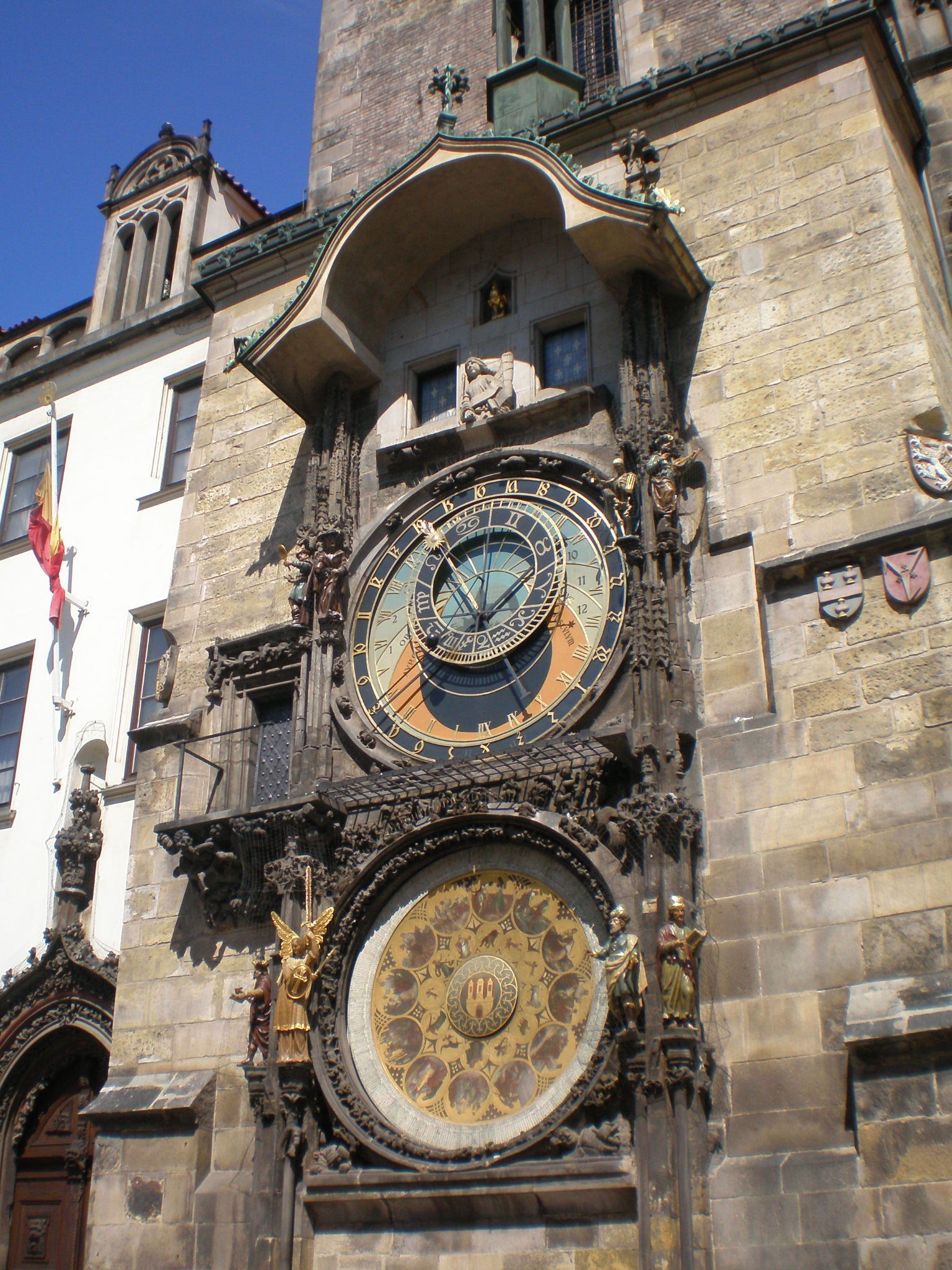 Orloj na Staroměstské radnici v Praze